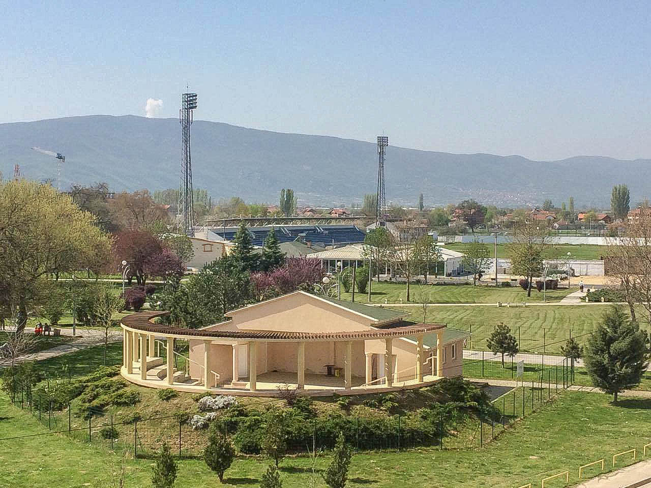 Стадион